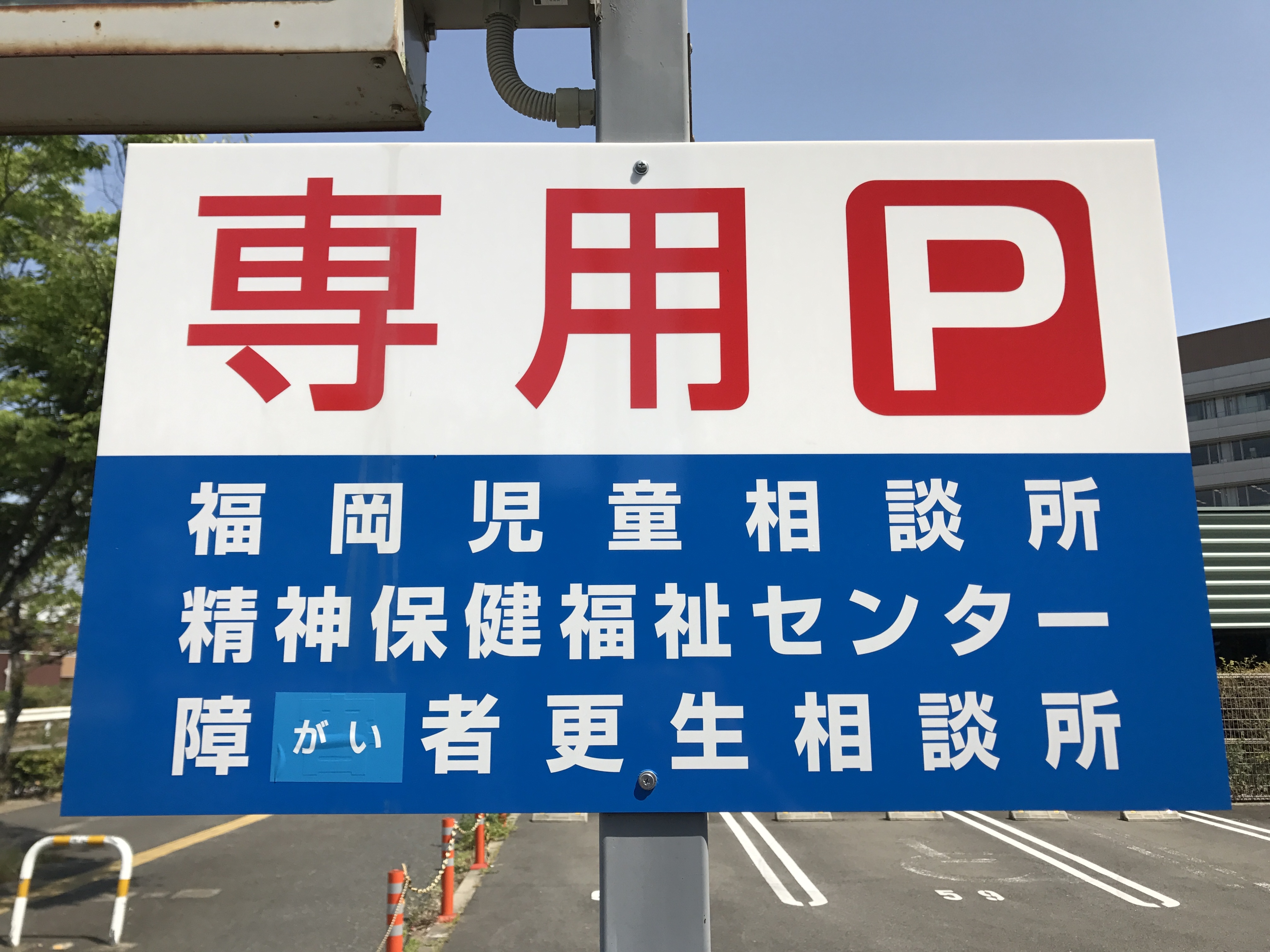 福岡児童相談所の駐車場標識